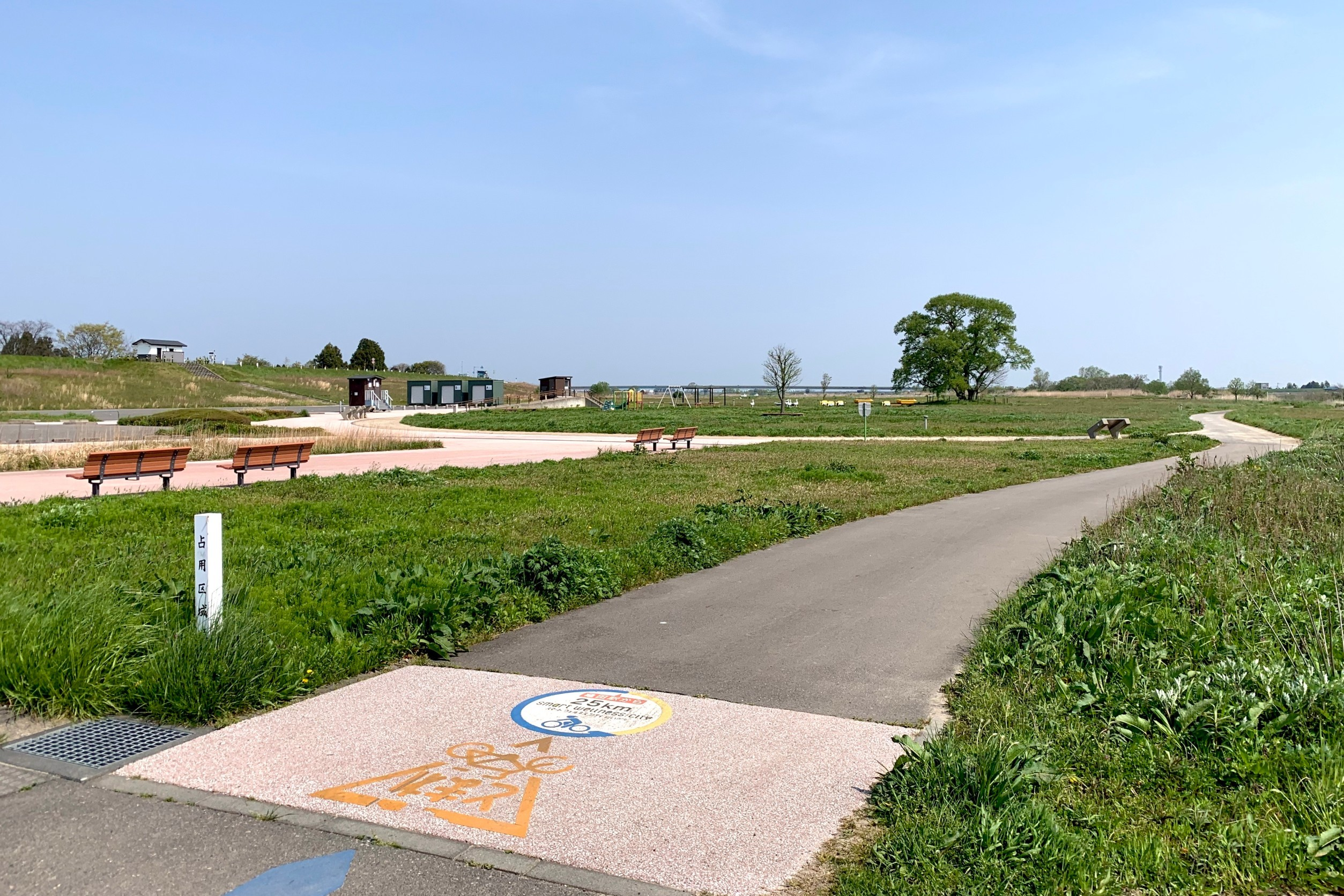 沢海床固め公園（阿賀野川フラワーライン）。大阿賀橋からこの公園を経由し酒屋町に至る区間においては阿賀野川・小阿賀野川沿いサイクリングロードが整備されている（2020年5月）